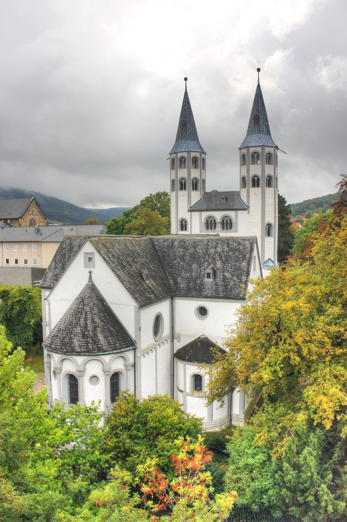 Neuwerkkirche